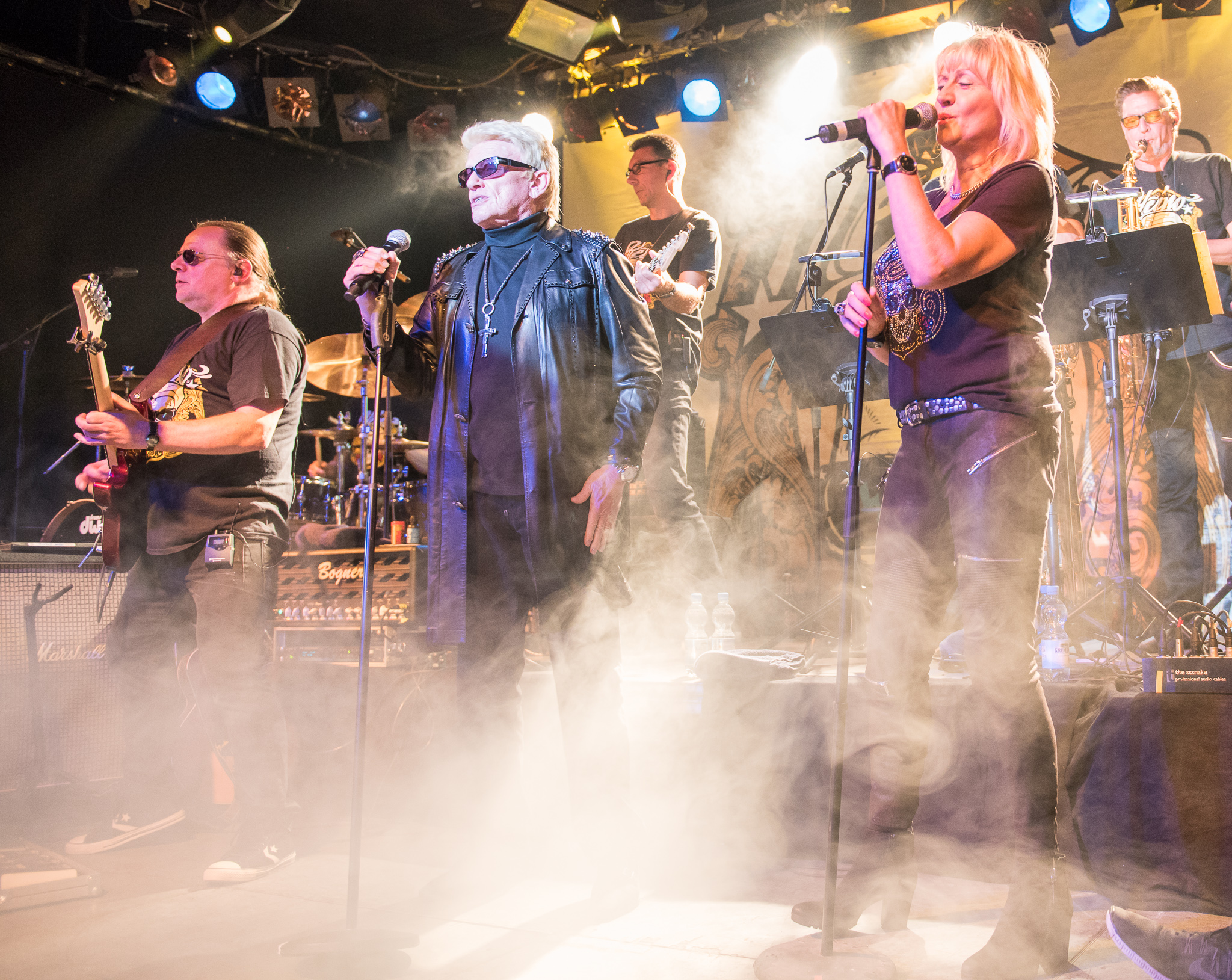 Concertbüro Franken,Der Hirsch,Heino,Konzert,Livekonzert,Livemusik,Musik